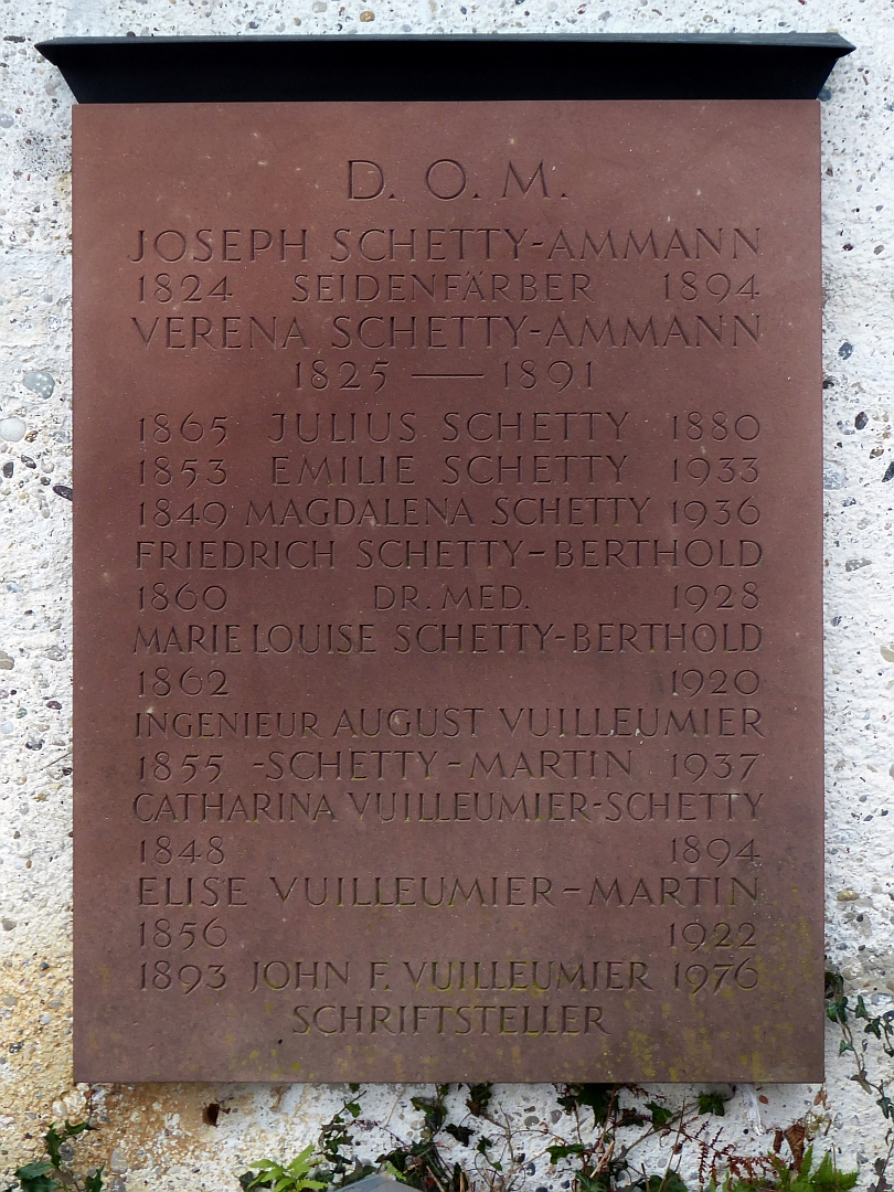 John Friedrich Vuilleumier (1893–1976) Jurist, Reisender Schriftsteller, Familiengrab auf dem Friedhof Hörnli, Riehen, Basel-Stadt